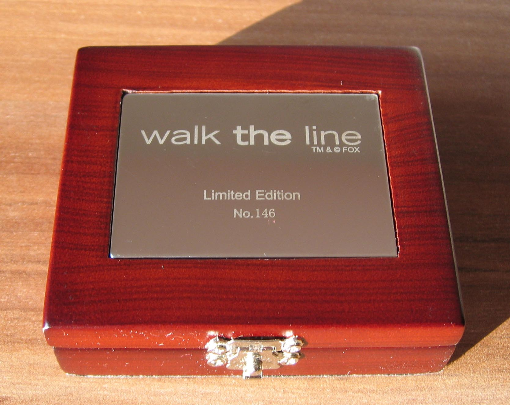 Anlässlich des Kinostarts von James Mangolds "Walk the Line"-Filmbiografie über den Country-Sänger Johnny Cash wurde eigens eine limitierte Edition nummerierter Schatullen produziert, die jeweils ein nummeriertes Plektrum mit dem Aufdruck "Walk the line / No. ..." enthalten.